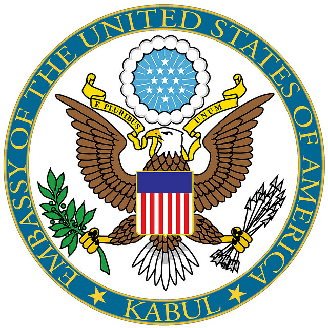 US Embassy Kabul logo (medium 640 size)